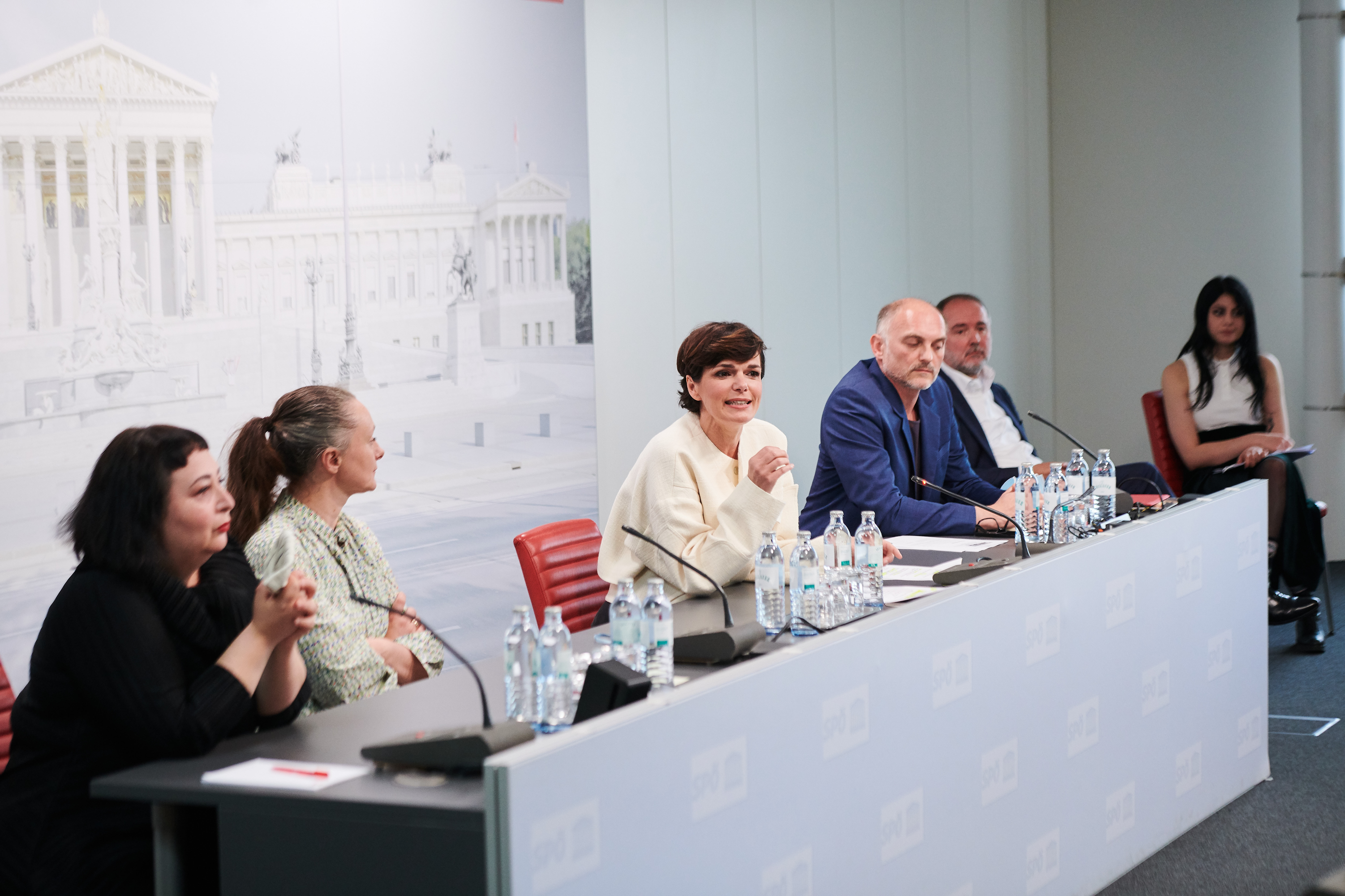 14.05.2020 ; Pressekonferenz „Rotes Foyer“ mit Rendi-Wagner und KünstlerInnen im SPÖ-Parlamentsklub ; An der Pressekonferenz zum Thema „Kultur ist systemrelevant – Arbeitsmöglichkeiten, Perspektiven und ein Rettungsschirm für KünstlerInnen und Kreative“ haben die SPÖ-Partei-und Klubvorsitzende Pamela Rendi-Wagner, SPÖ-Kultursprecher Thomas Drozda, Schauspielerin Gerti Drassl, Regisseur und Puppenspieler Nikolaus Habjan, die Schriftstellerin Julya Rabinowich, Filmemacherin Kurdwin Ayub sowie Regisseur Markus Schleinzer teilgenommen. © SPÖ-Parlamentsklub/ K. Prinz